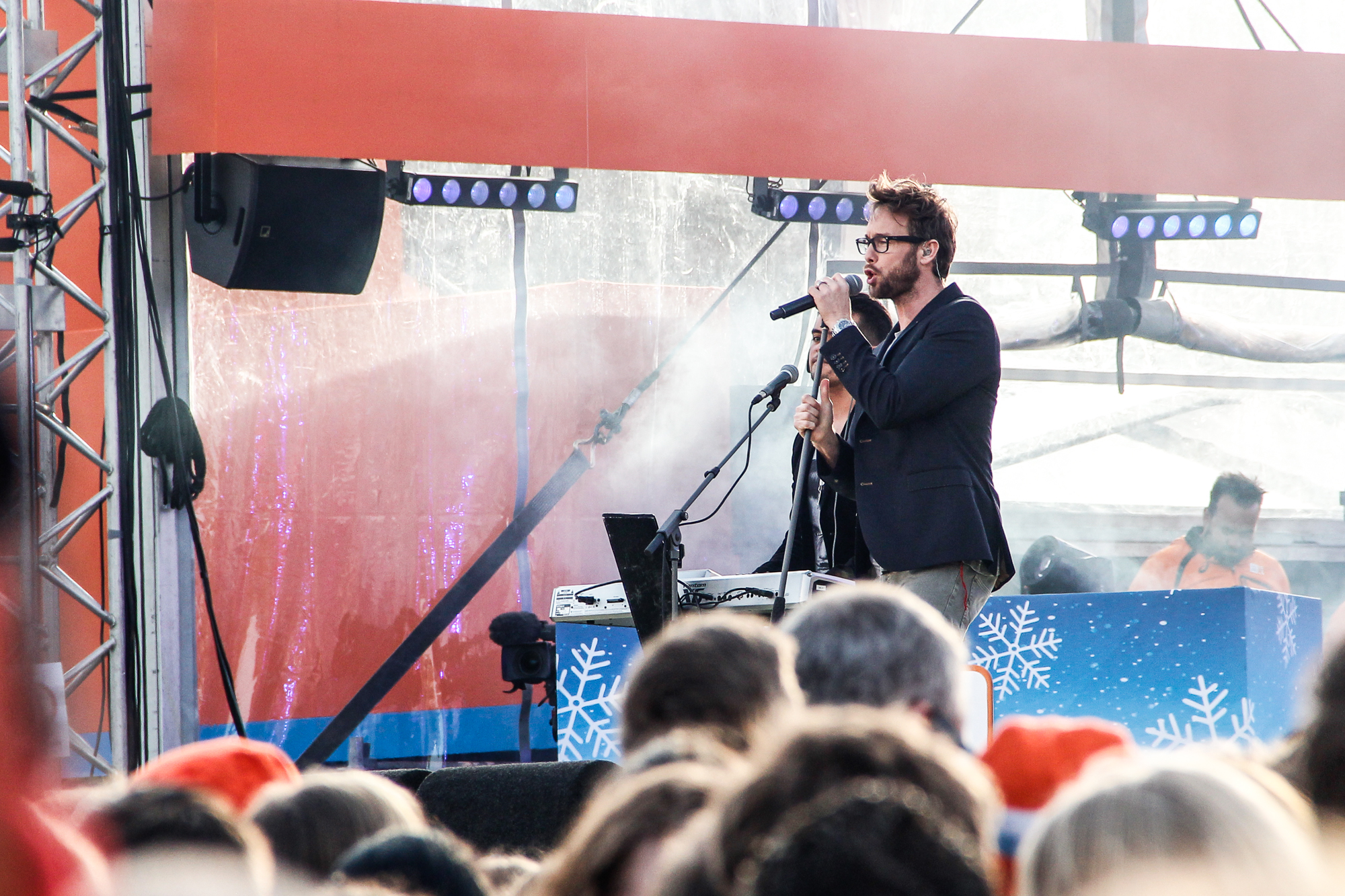 Ontvangst Olympische sporters van de Olympische Spelen in Sotsj in Welkom Thuis stad Assen 2014